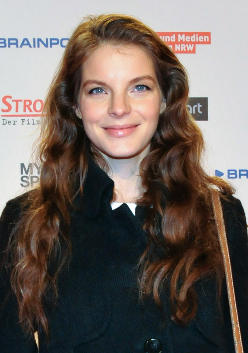 Yvonne Catterfeld auf der Premiere von "Stromberg - Der Film" in Köln am 18. Februar 2014.